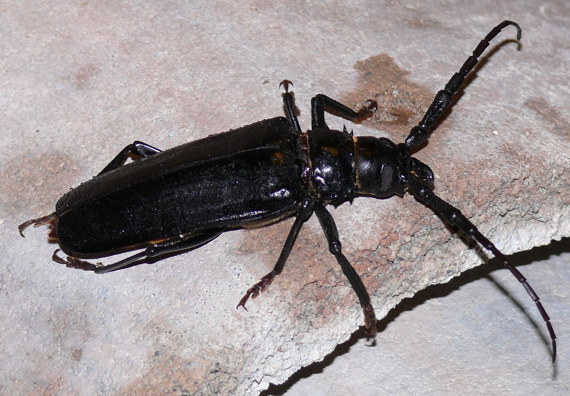 Derobrachus geminatus, Palo Verde Borer Beetle